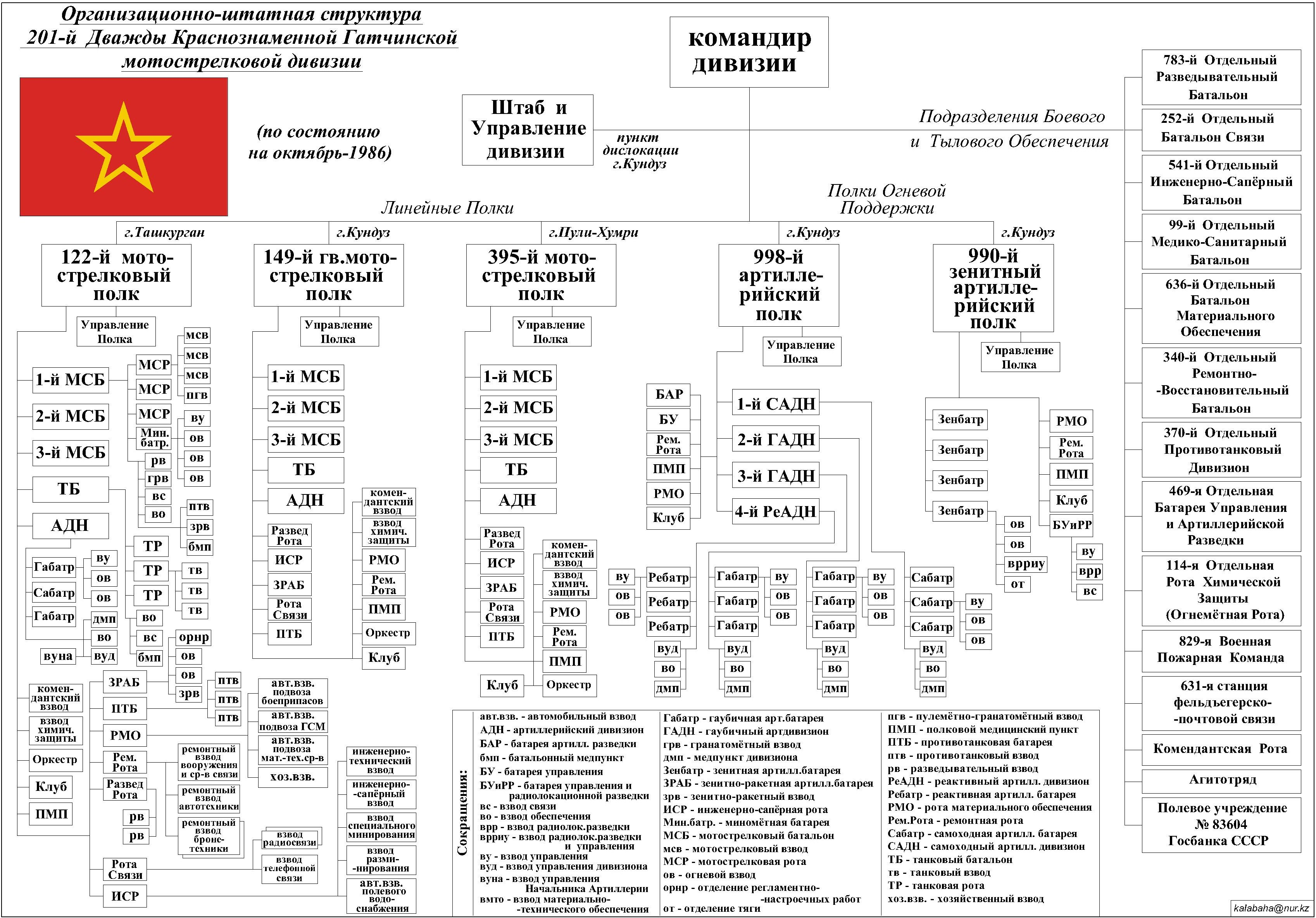 Организационно-штатная структура 201-й дважды Краснознамённой Гатчинской мотострелковой дивизии. По состоянию на октябрь-1986. Схема составлена по материалам Бешкарёва Александра Ивановича "ПЕРЕЧЕНЬ СОВЕТСКИХ ВОИНСКИХ ЧАСТЕЙ В АФГАНИСТАНЕ (1979-1989 гг.)" а также по данным сайта 149-го мсп. Отчерчено в AutoCAD 2005 собственноручно. Источник данных - и